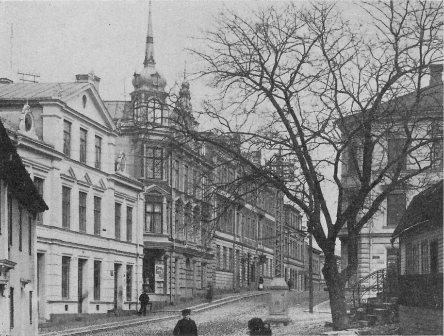 Köpmangatan i Oskarshamn omkring förra sekelskiftet.